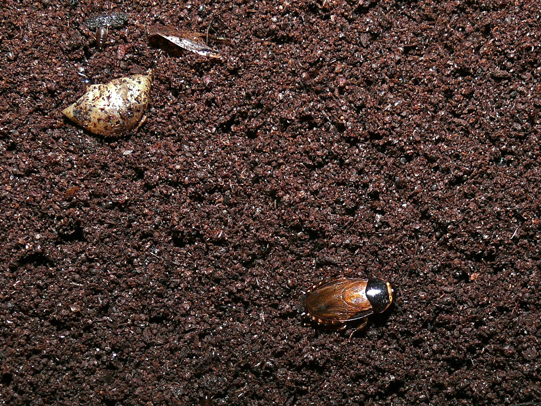 Deer Cave, Gunung Mulu NP, Sarawak, MALAYSIA